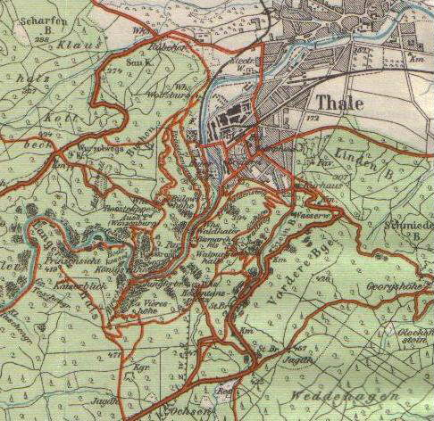 Karte von Thale mit Hexentanzplatz im Süden, Maßstab 1:50.000 (1912)